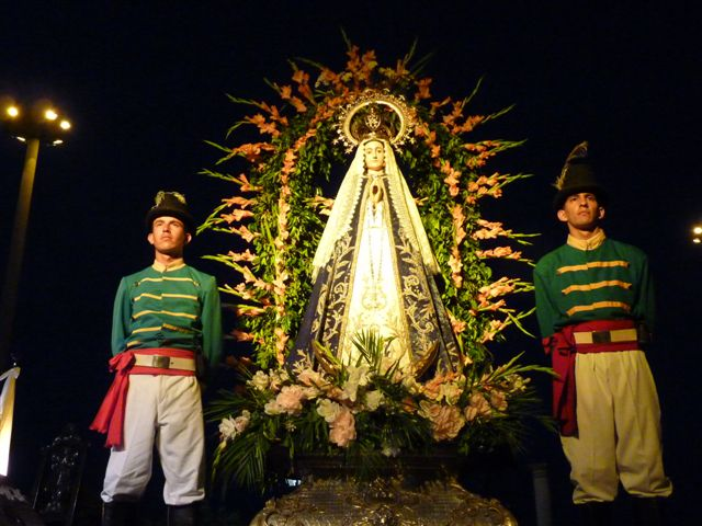 Verge d'Itati Corrientes, Argentina, dab l'autorizacion de l'Arqibisbat (Arzobispado de Corrientes)